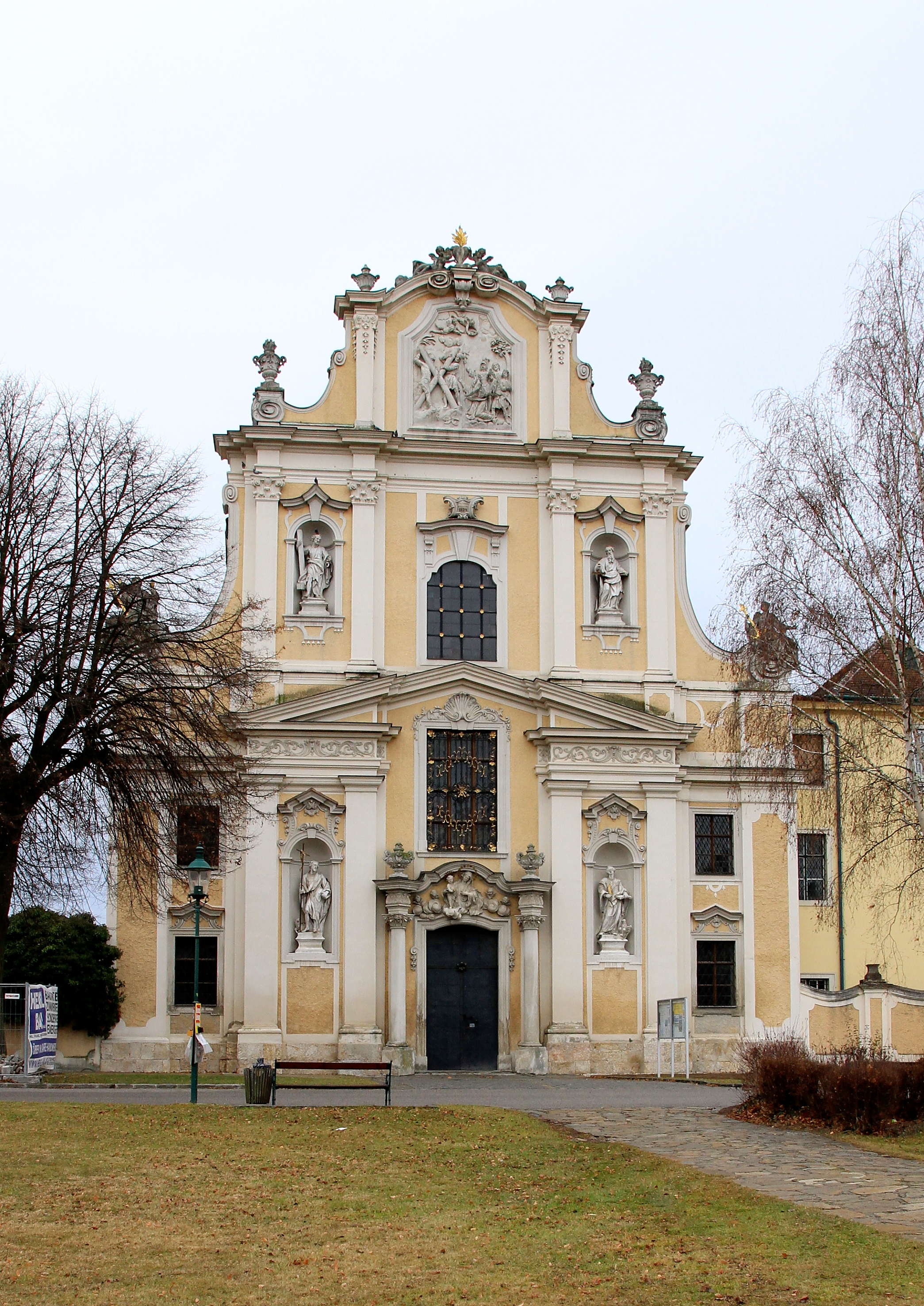 Die 3-zonige Hauptfassade der Pfarrkirche (ehemalige Stiftskirche) hl. Andreas in St. Andrä an der Traisen, ein Ortsteil der niederösterreichischen Stadt Herzogenburg.